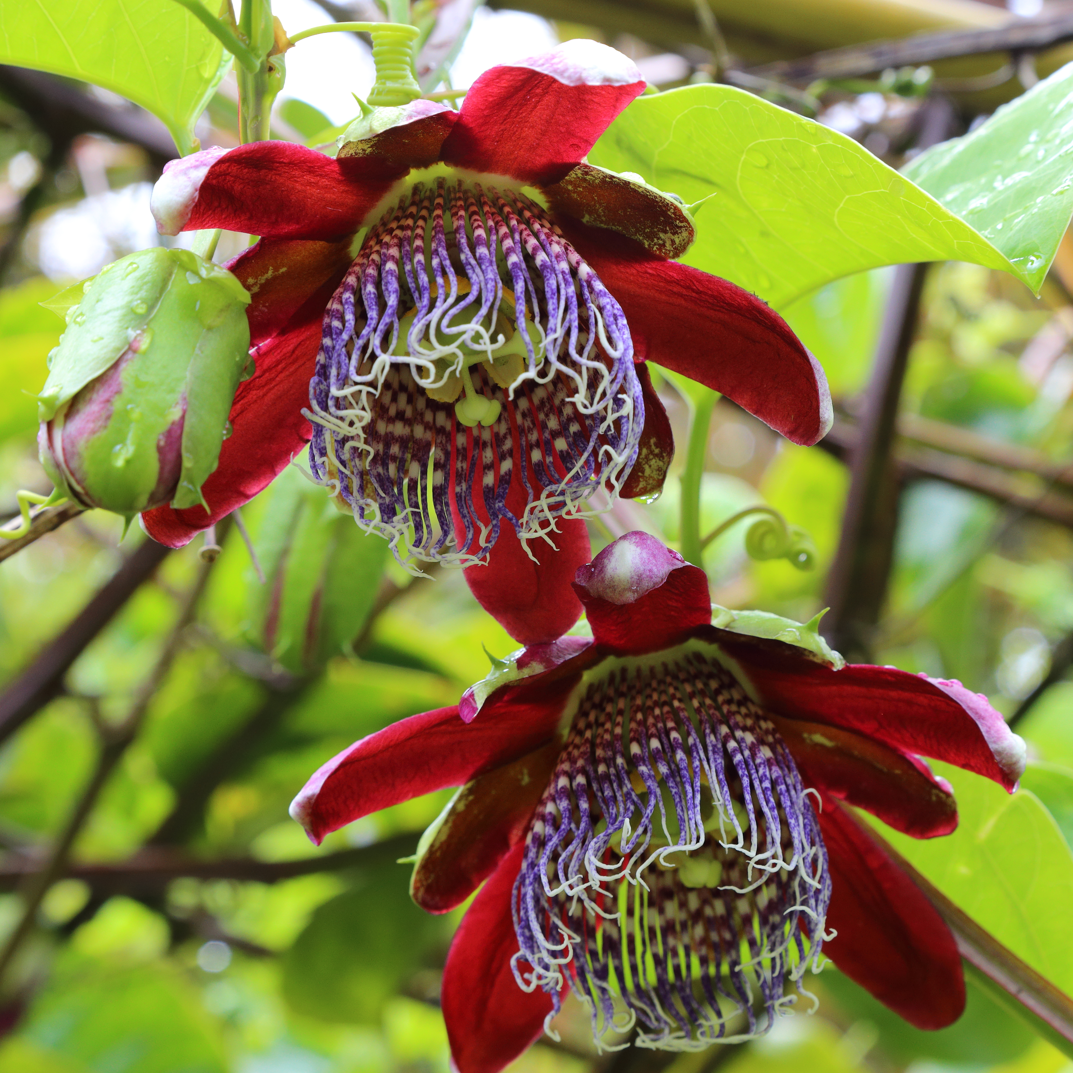 Passiflora alata i parken Terra Nostra, Furnas, Azorerna.